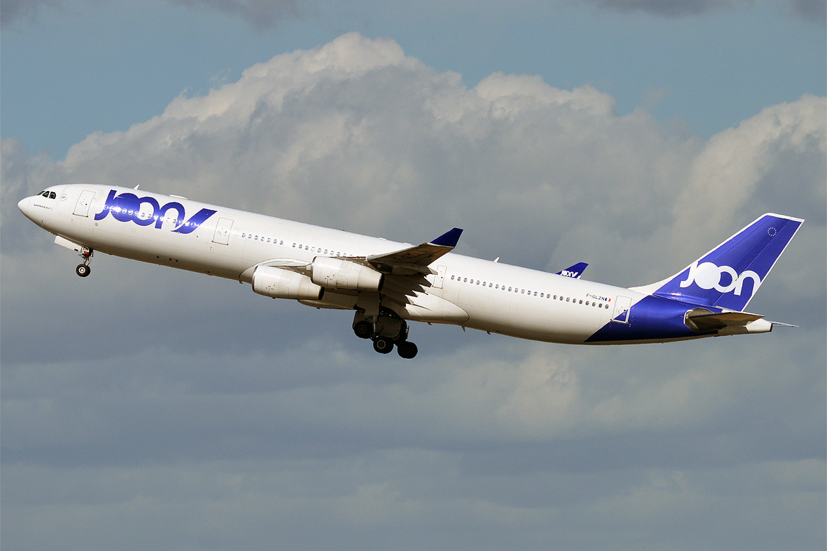 JOON, F-GLZN, Airbus A340-313